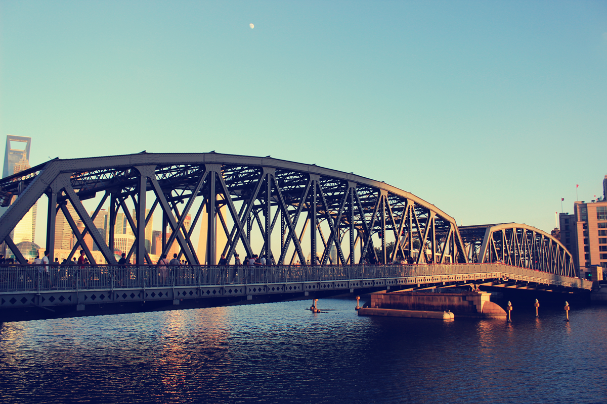 外白渡桥（由上海大厦门前拍摄）